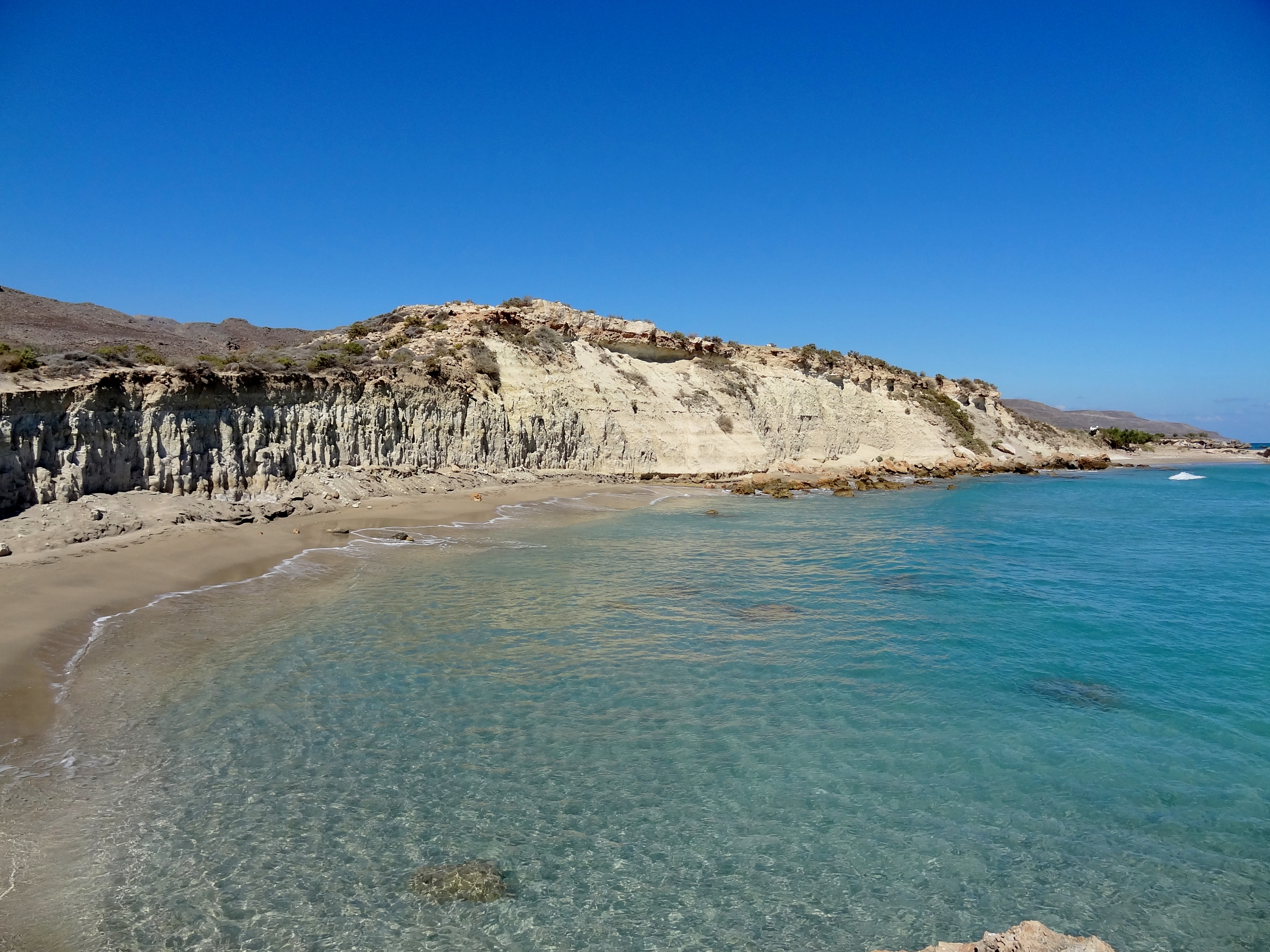 Paralia Argilos (Παραλία Άργιλος ‚Tonstrand‘), Kreidestrand an der Südostküste Kretas bei Xerokambos (Ξερόκαμπος), Gemeinde Sitia, Kreta, Griechenland